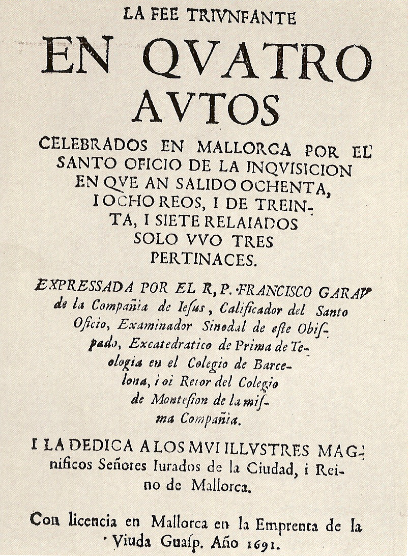 Portada de la primera edició de la Fe Triunfante